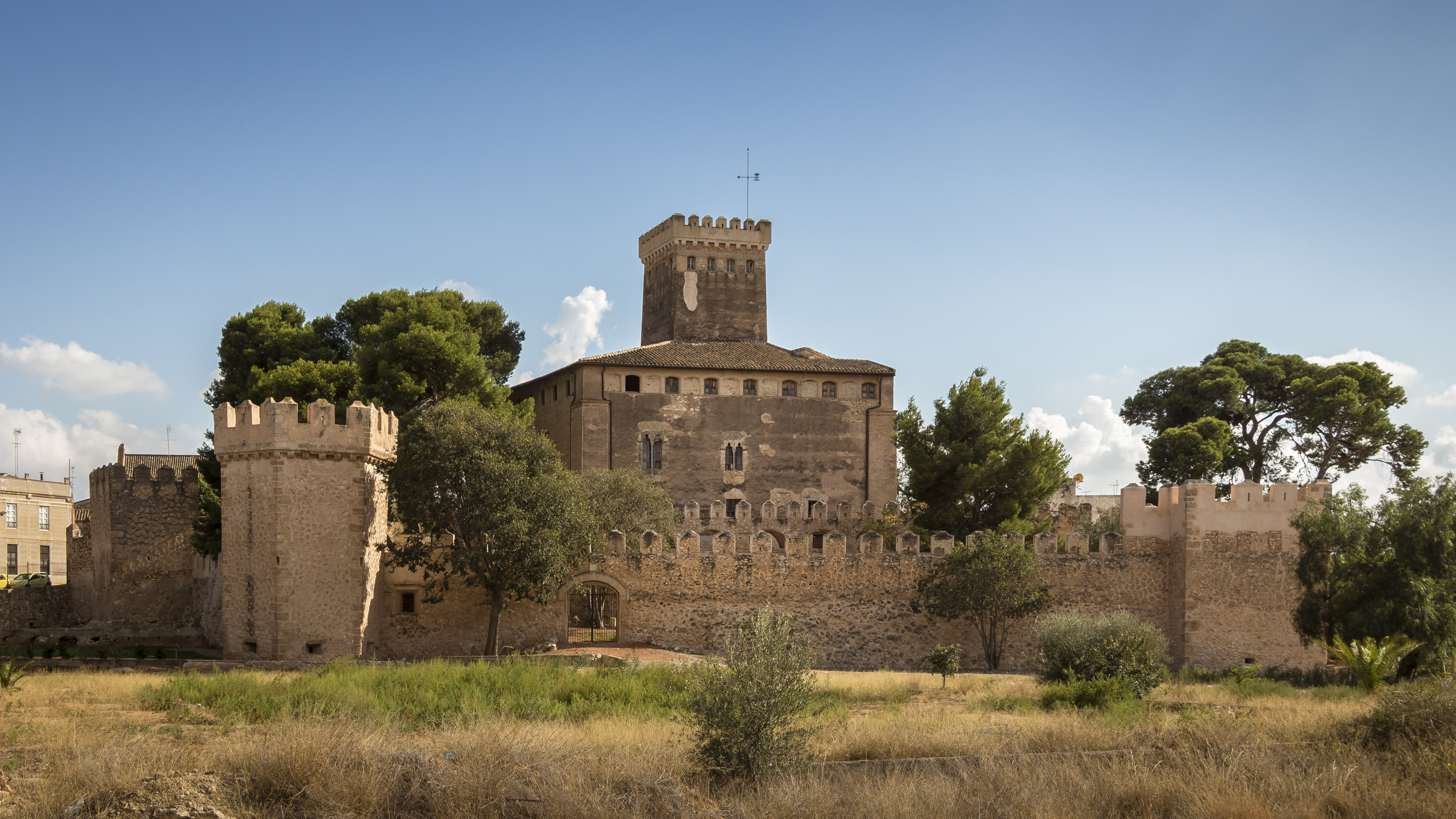 El Castillo de Benisanó es el rasgo más característico de esta localidad, así como una de las fortalezas mejor conservadas de la Comunidad Valenciana. Aquí se muestra la vista de su parte trasera, desde el norte del castillo.